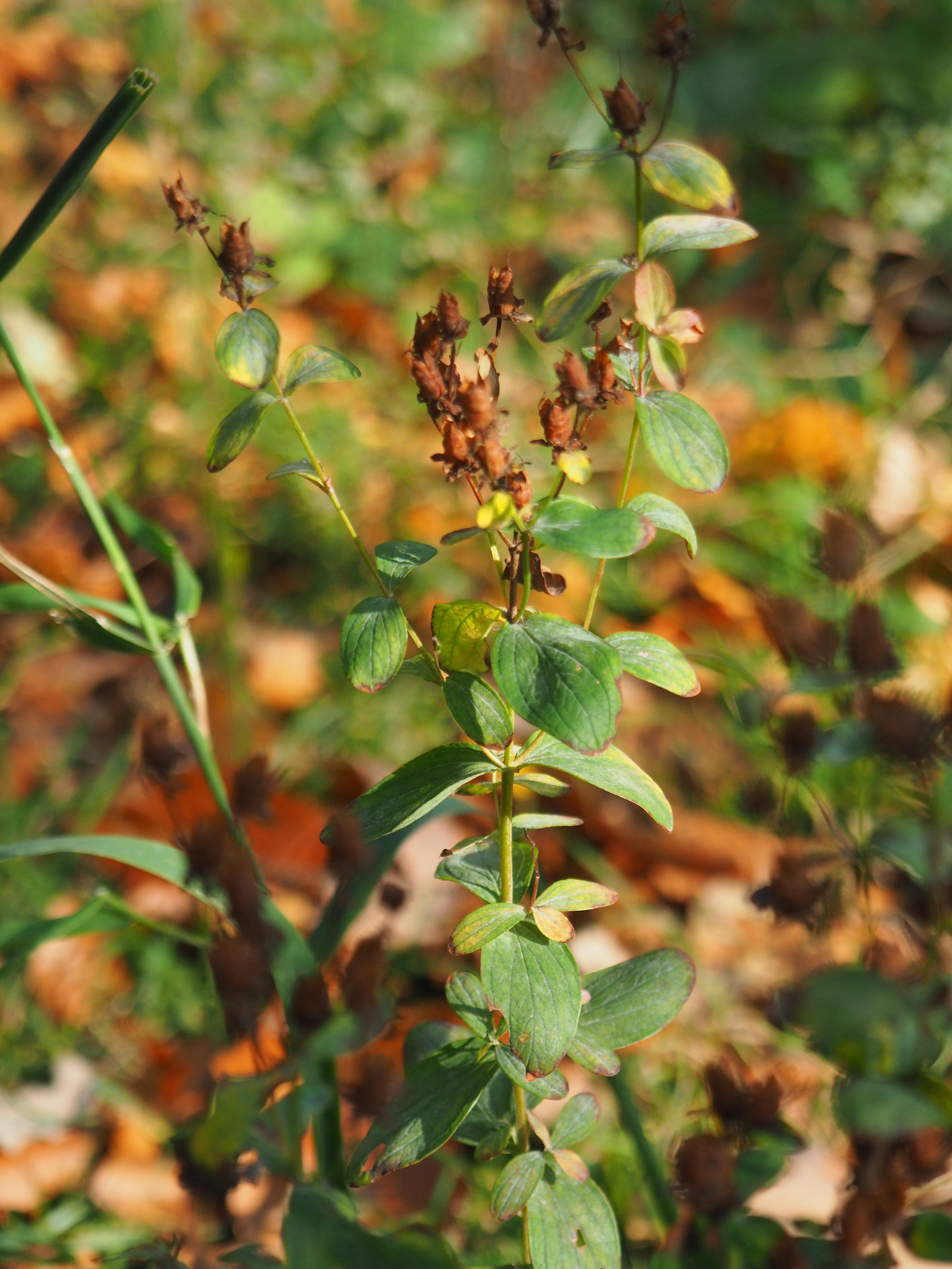 bylinný porost